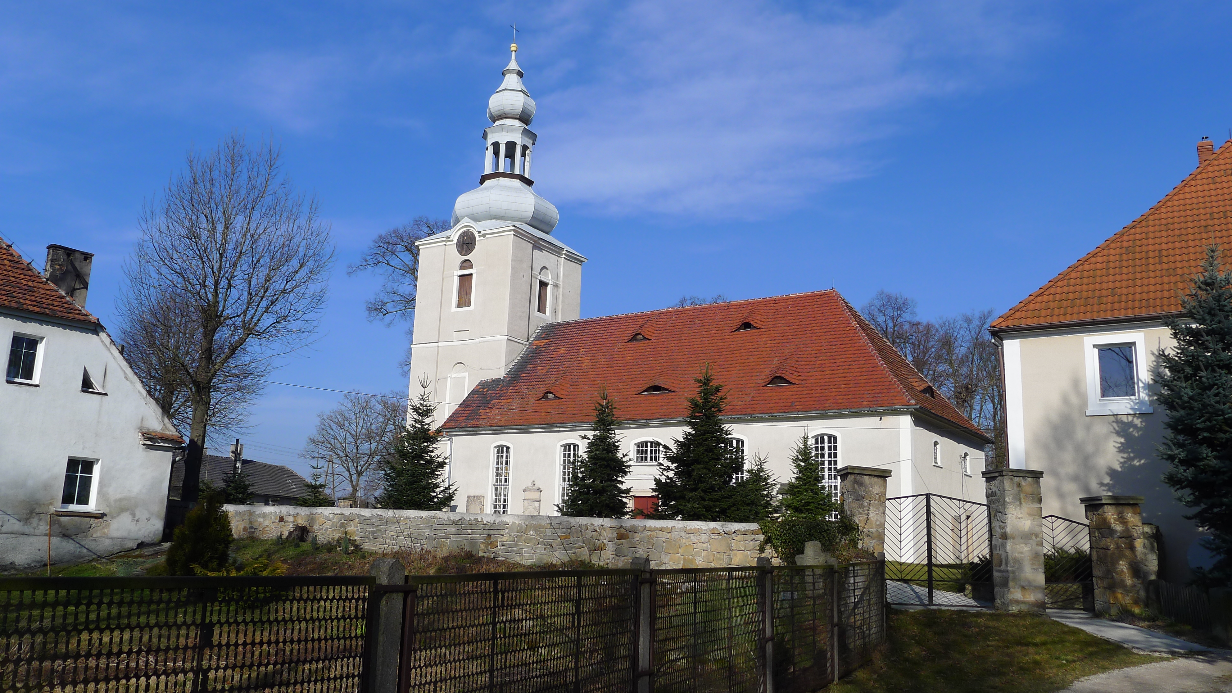 Modlikowice - kościół pw. MB Częstochowskiej